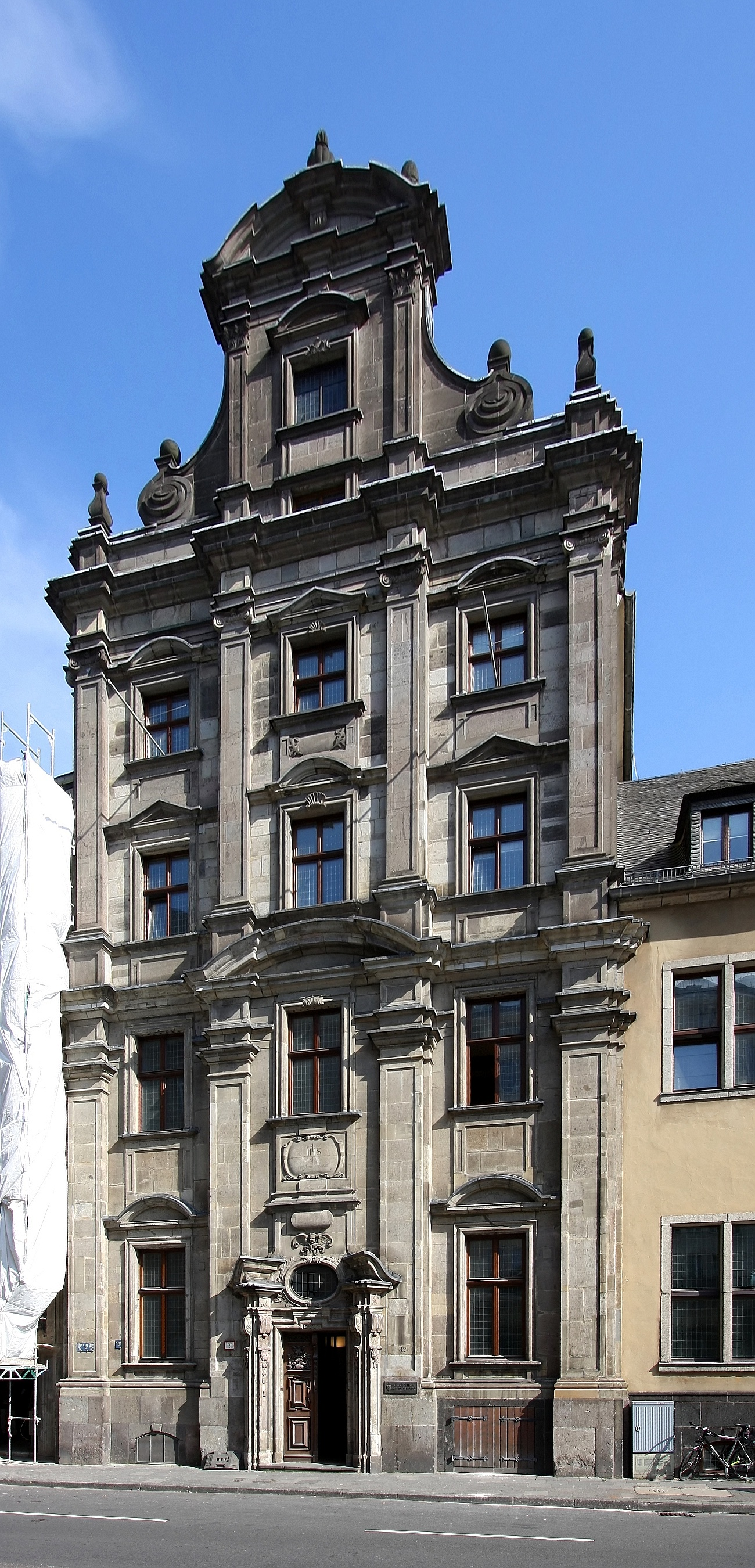 Erzbischöfliches Generalvikariat, Marzellenstr. 32, Köln